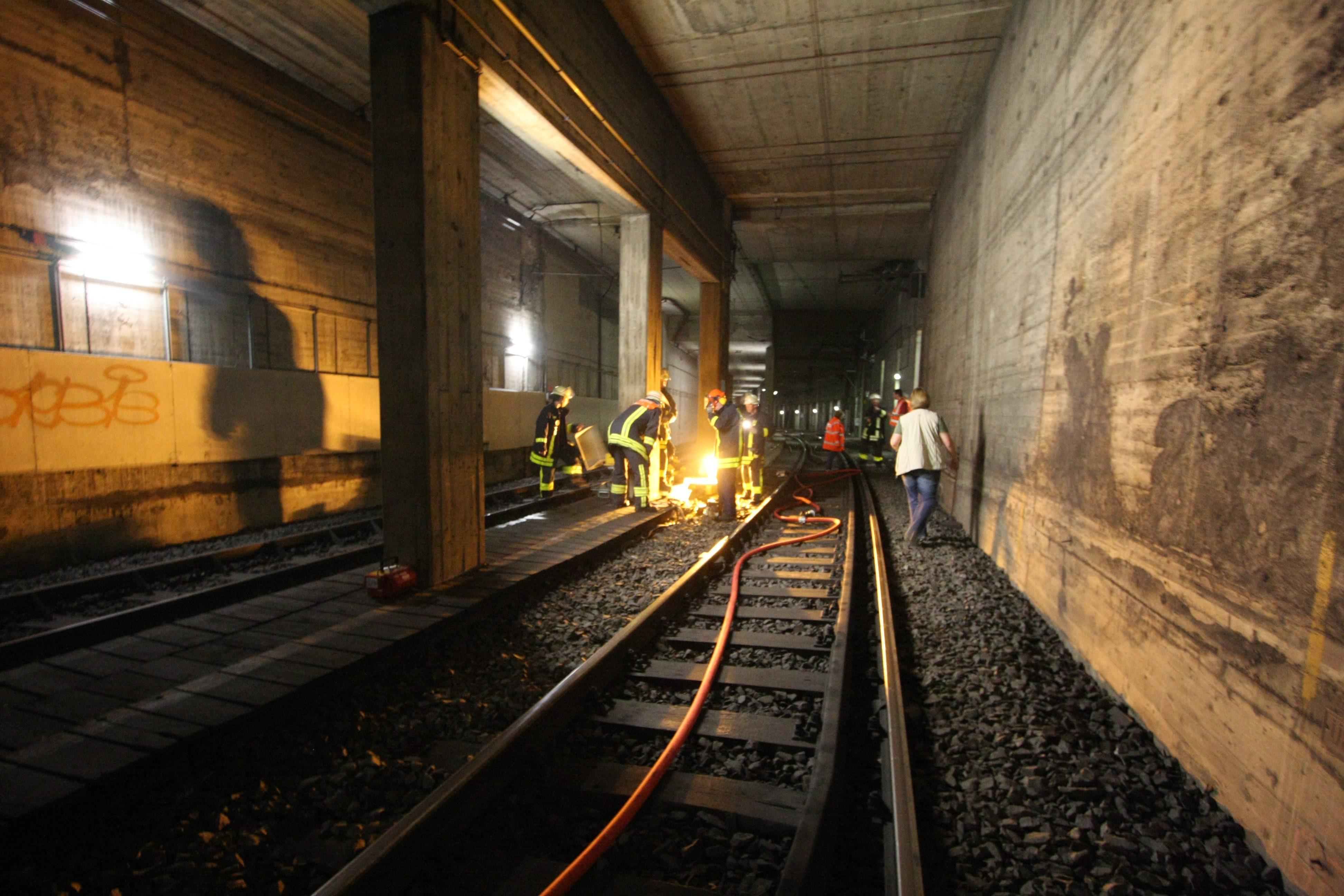 Arbeiter beheben die Schäden eines Kabelbrandes im S-Bahn-Tunnel am Hauptbahnhof Frankfurt